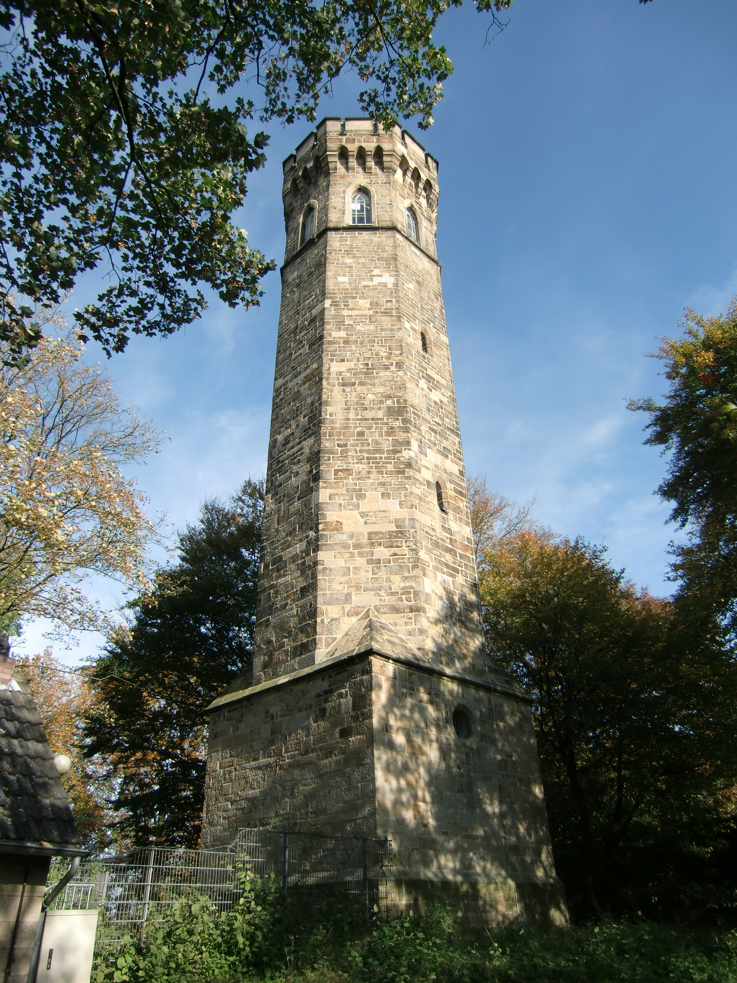 Vincketurm an der Hohensyburg in Dortmund-Syburg, Deutschland